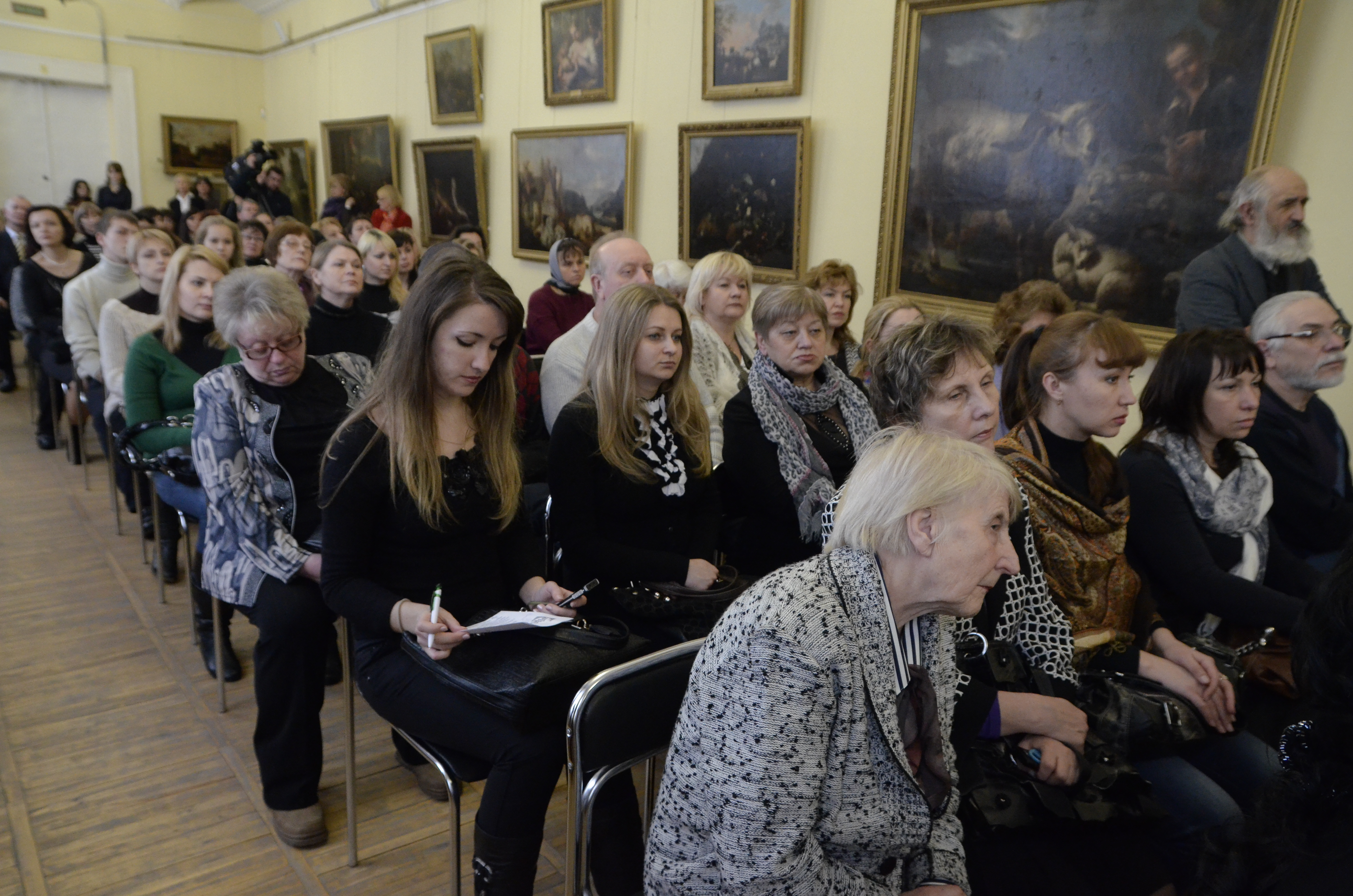 Презентация каталога «100 икон» в Донецком областном художественном музее